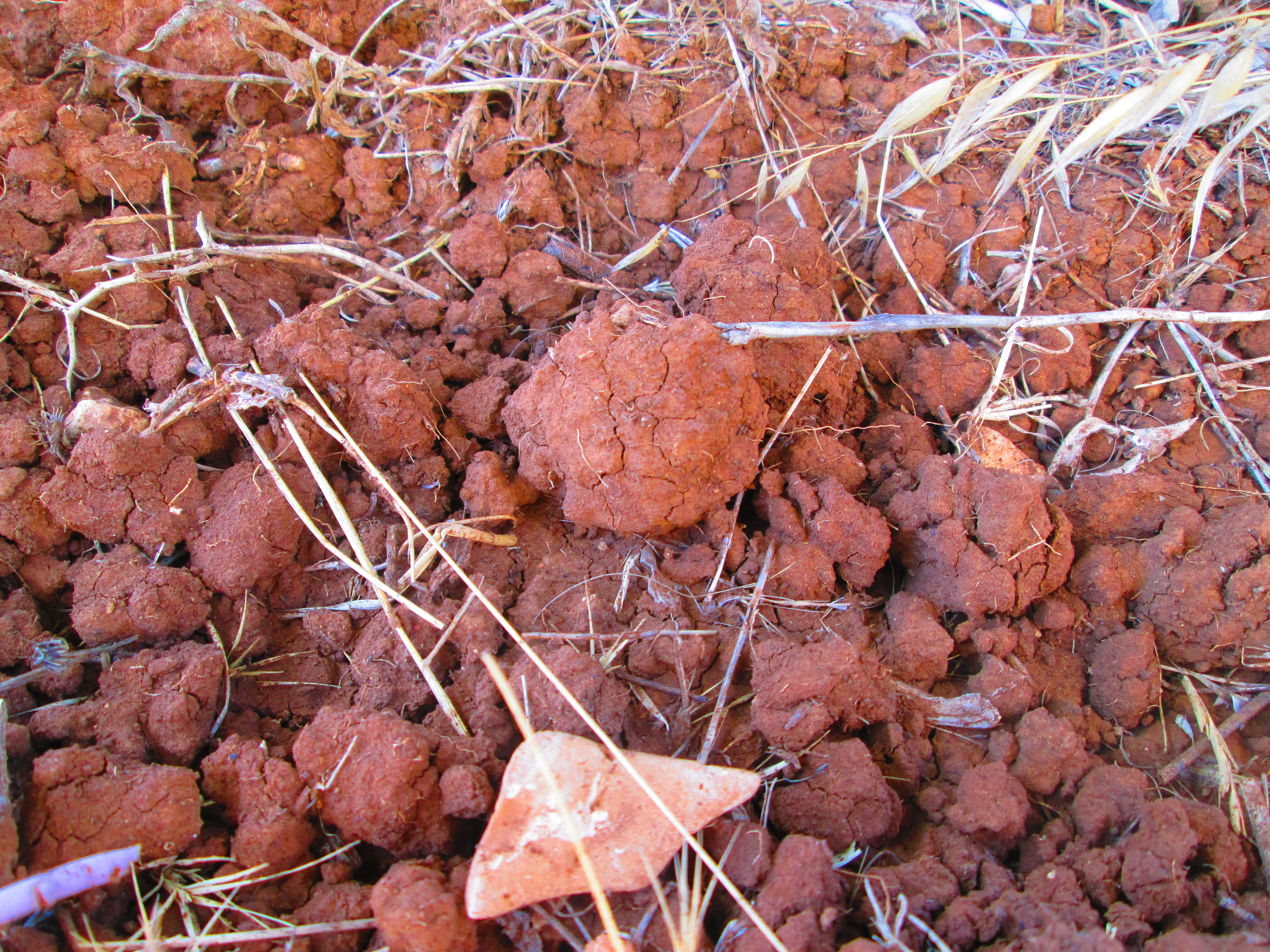 אדמת טרה רוסה מבט מקרוב